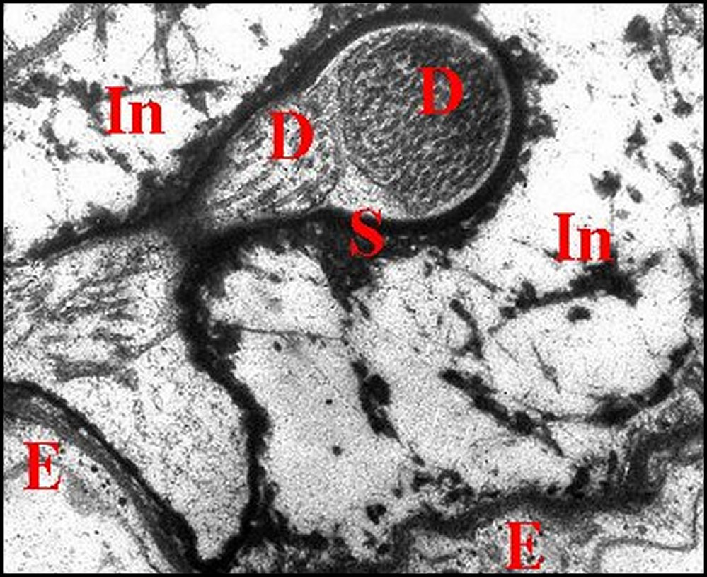 Dendrites entourés par la gaine scolopale vus au au microscope électronique à transmission